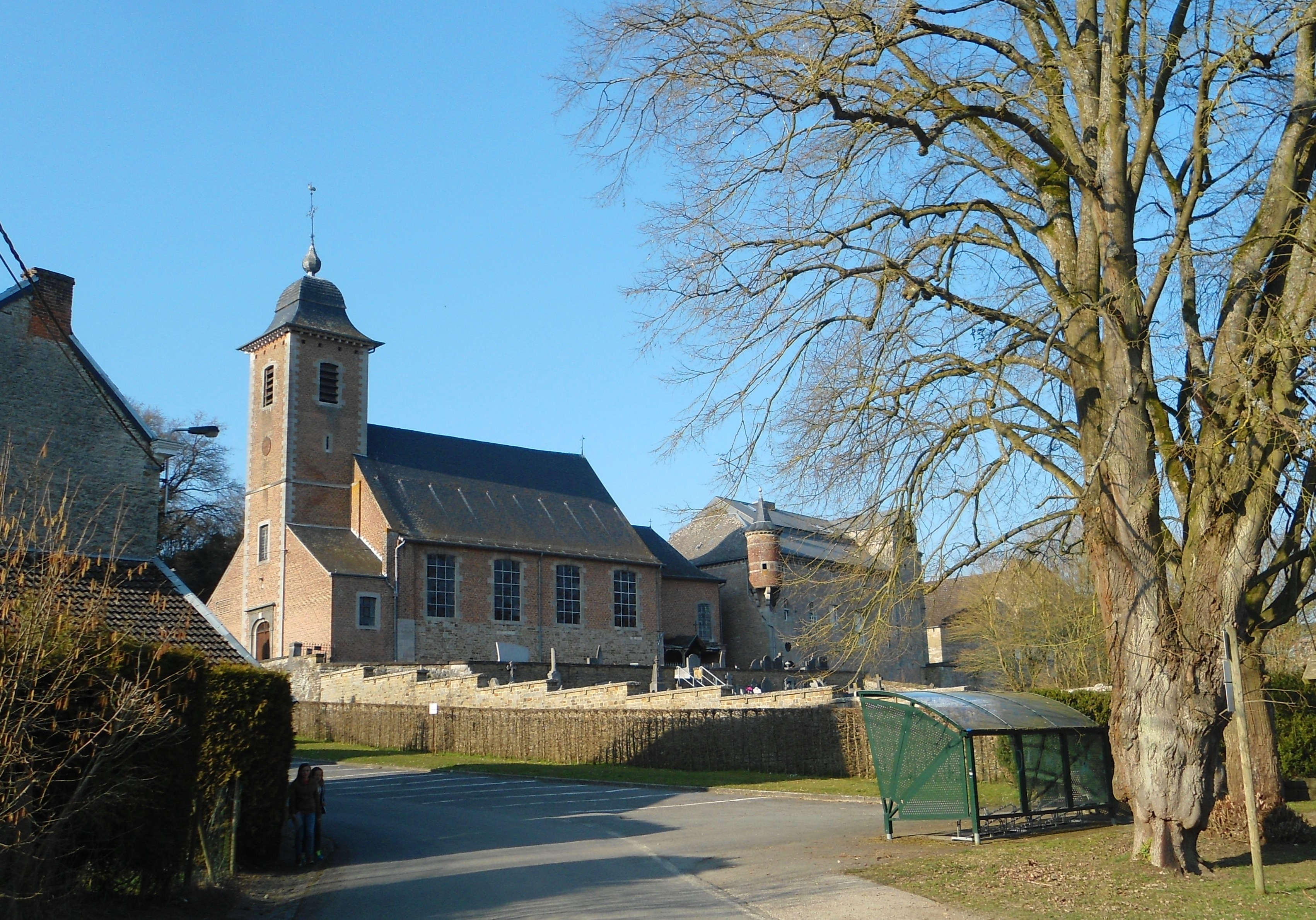 Eglise et ferme fortifiée de Tavier